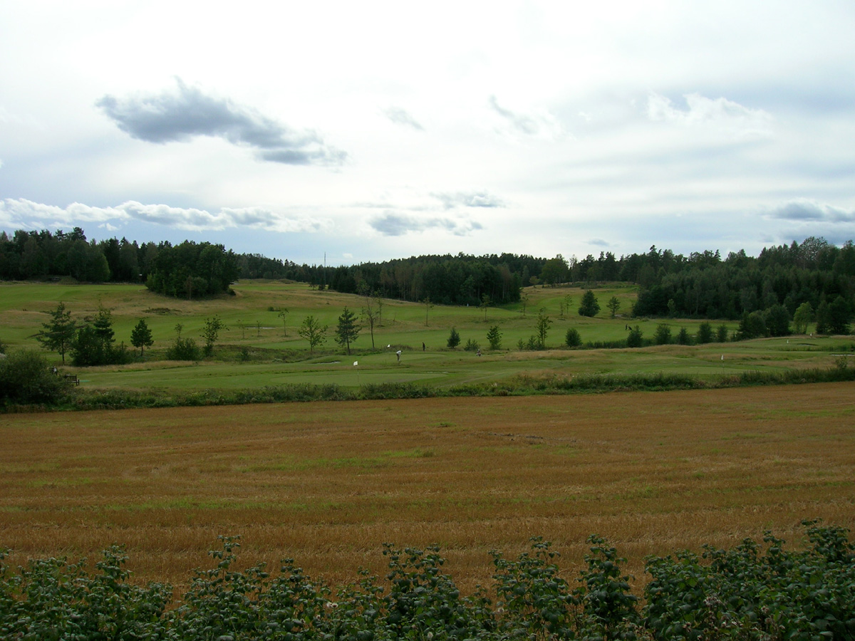 Nøtterøy golfbane